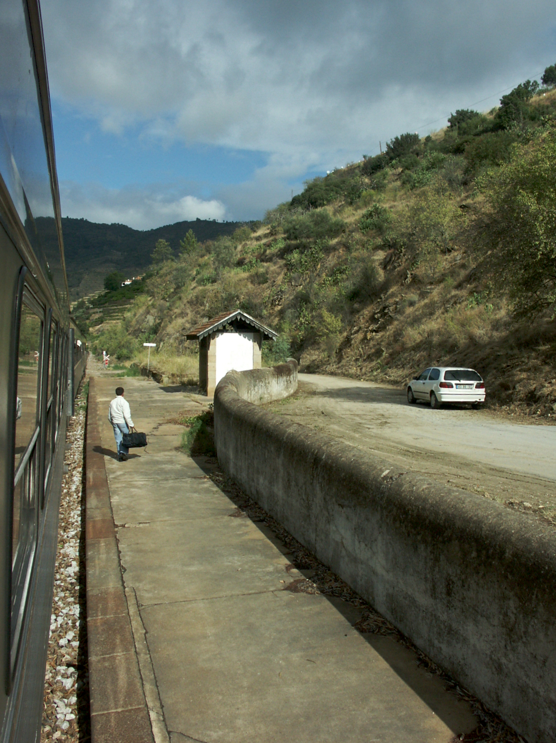 a bordo do InterRegional 861. Tipo: A [Apeadeiro] Local: São Mamede do Tua Linha do Douro, PK 138] Data e hora: 19 de Agosto de 2006 [09h58]